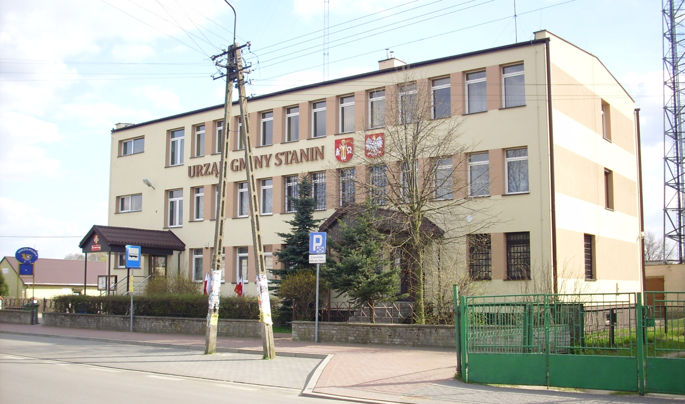 Stanin (pow. łukowski, woj. lubelskie) – Urząd Gminy.